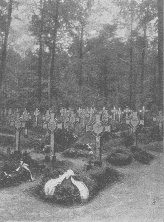 Waldfriedhof in Stuttgart, Kriegsgräberfeld feld des Vaterländischen Gesangvereins Ehrenfeld Stuttgart, 1924.